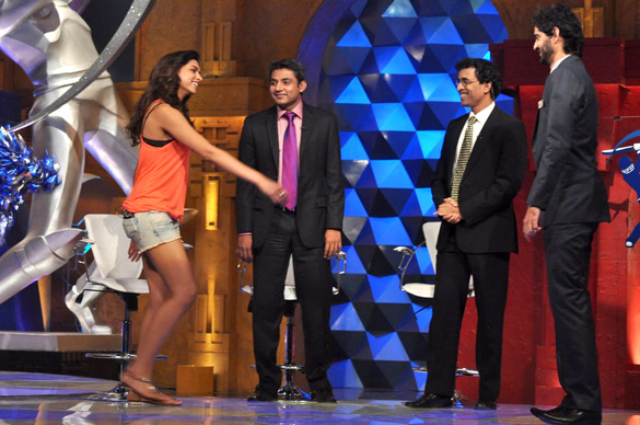 Deepika Padukone,Ajay Jadeja,Harsha Bhogle,Gaurav Kapoor on DLF IPL's Extraaa Innings